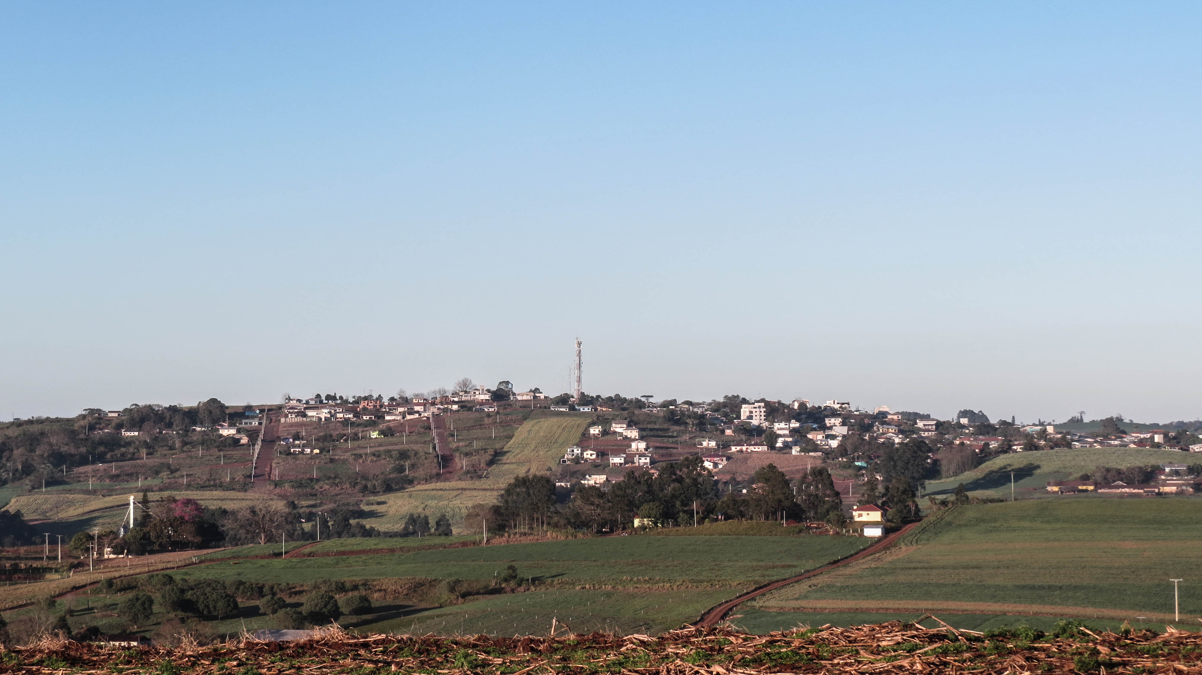 Cidade de Iporã do Oeste vista de longe